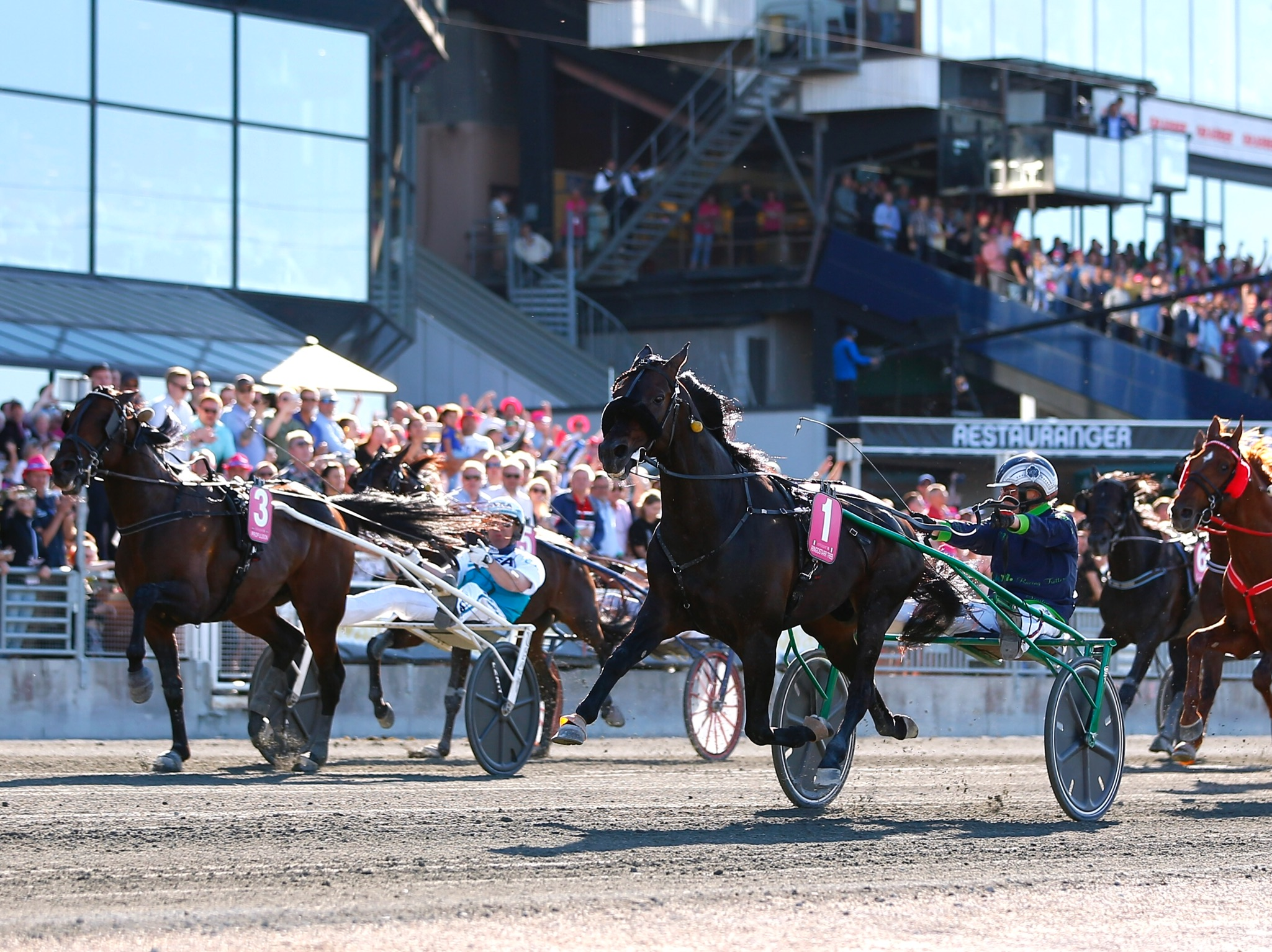 Ringostarr Treb & Wilhelm Paal vinner finalen av Elitloppet 2018 före Propulsion & Örjan Kihlström.